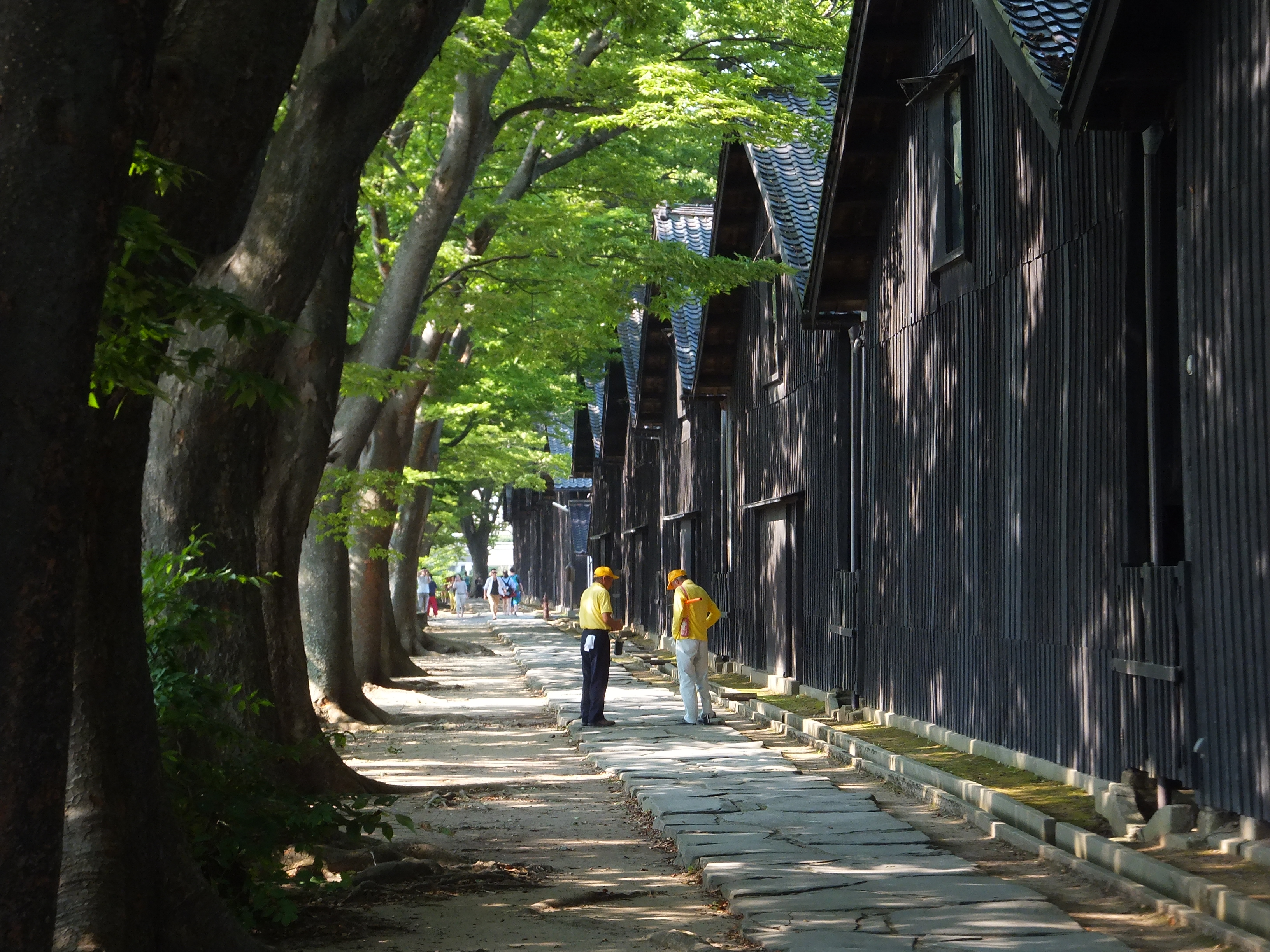 山形県酒田市、山居倉庫のケヤキ並木。セミが喧しかった。